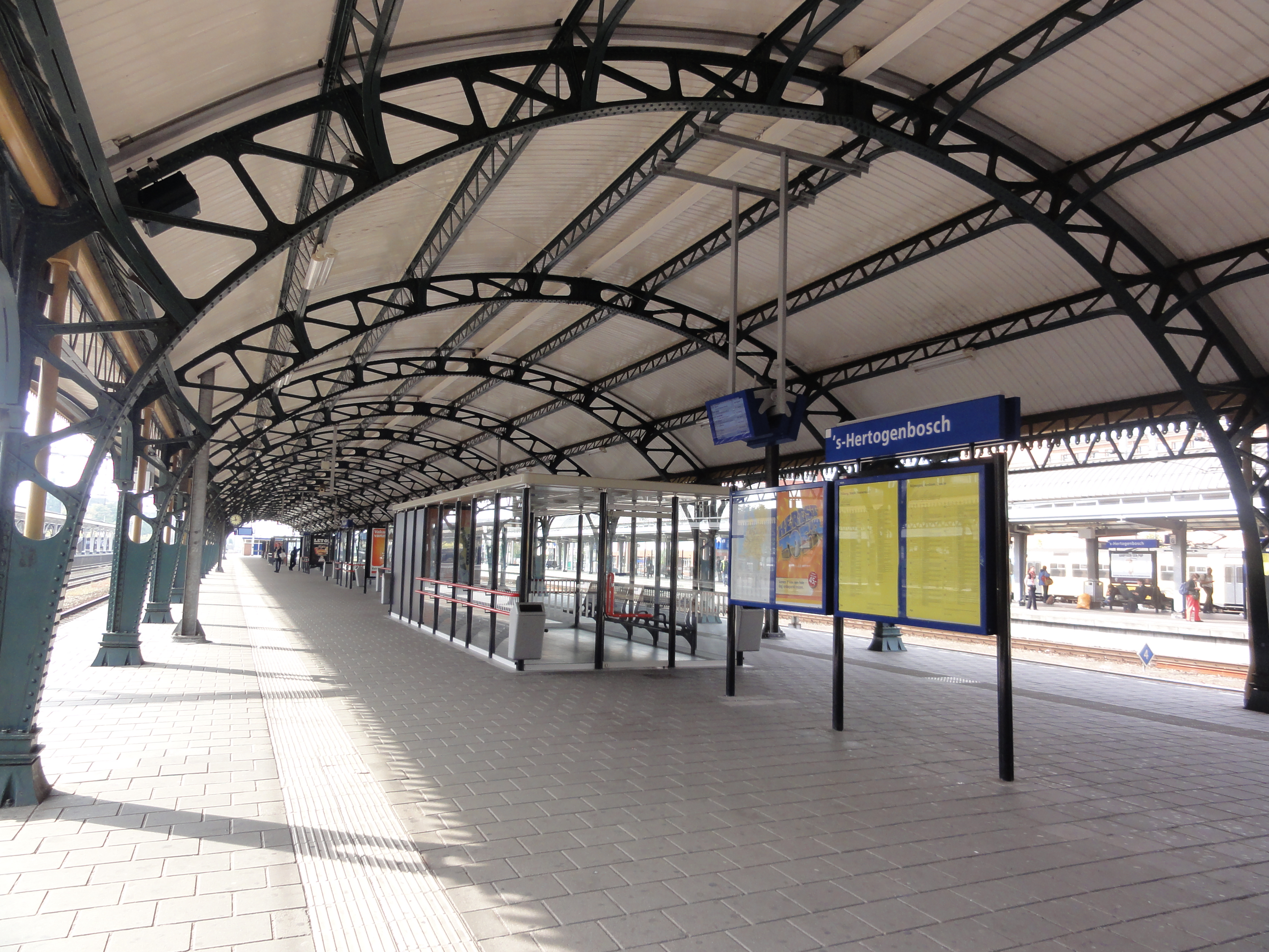 's-Hertogenbosch Rijksmonument 474774 Stationskappen 41″ N, 5° 17′ 37.59″ E